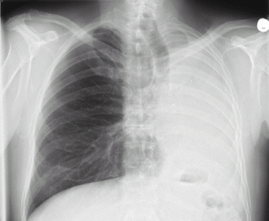 Befund Voraufnahmen zum Vergleich oder nähere Angaben zur Vorgeschichte liegen nicht vor. Verschattung der linken Lunge bei Z. n. linksseitiger Pneumektomie, am ehesten im Sinne eines vollständig mit Sekret gefüllten linksseitigen Hemithorax. Konsekutive Überblähung der rechten Lunge mit Verlagerung der Trachea nach links. Ansonsten unauffällige rechte Lunge. Rechts kein Pneumothorax, kein Erguss. Keine Zeichen einer kardialen Dekompensation.